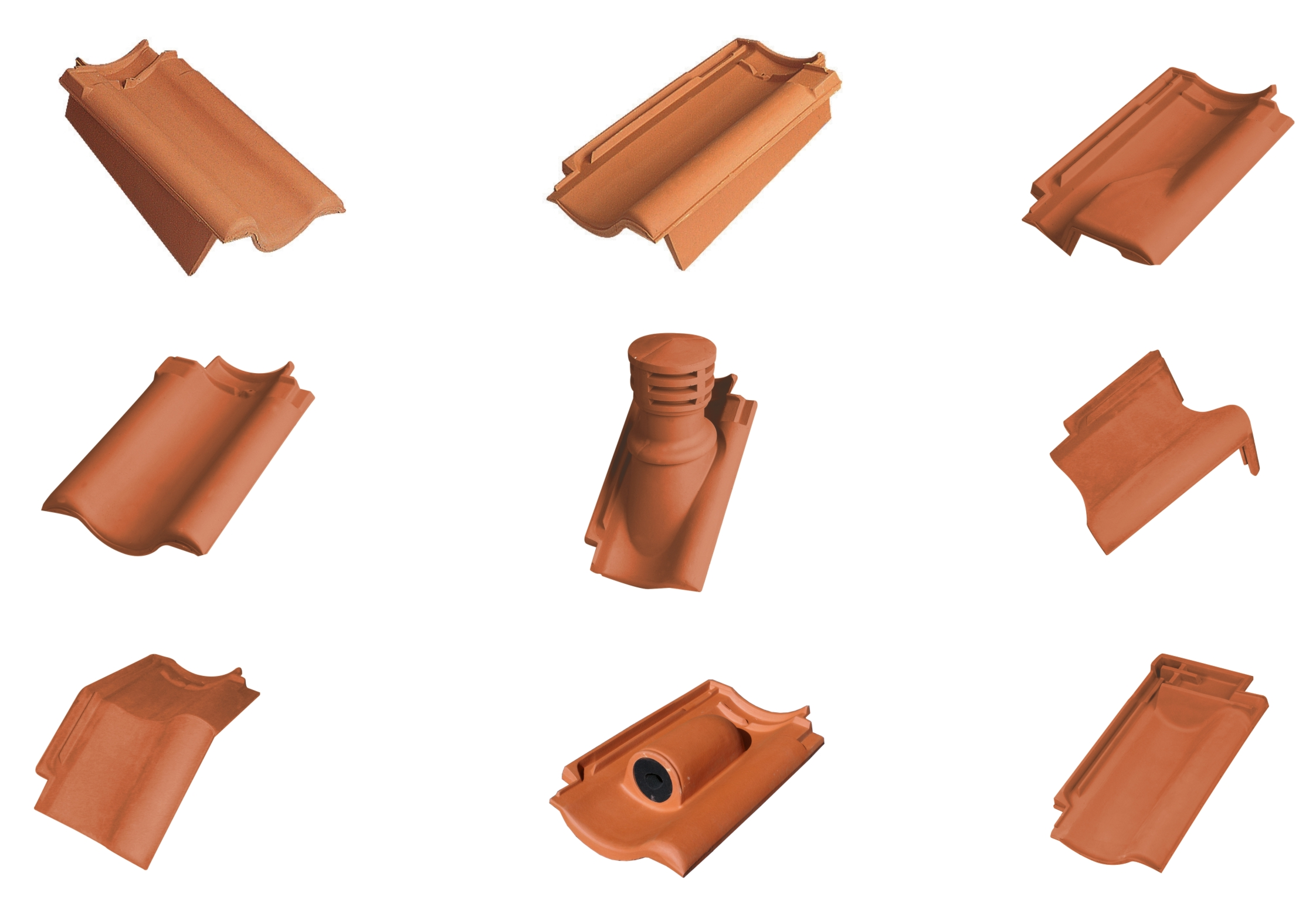 verschiedene Formziegel naturrot